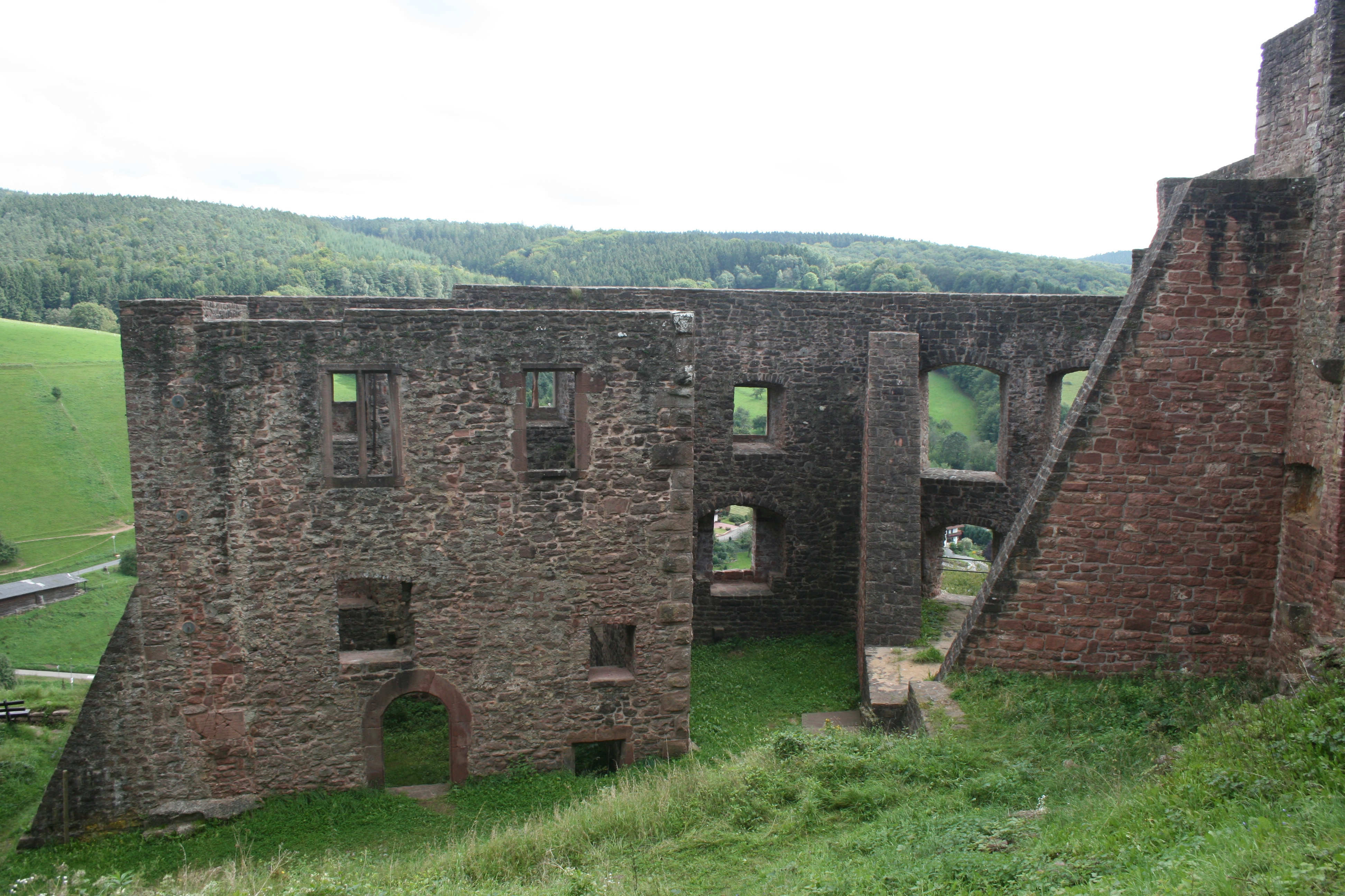 Burgruine Freienstein, Blick im Inneren der Kernburg nach Osten (Palas).